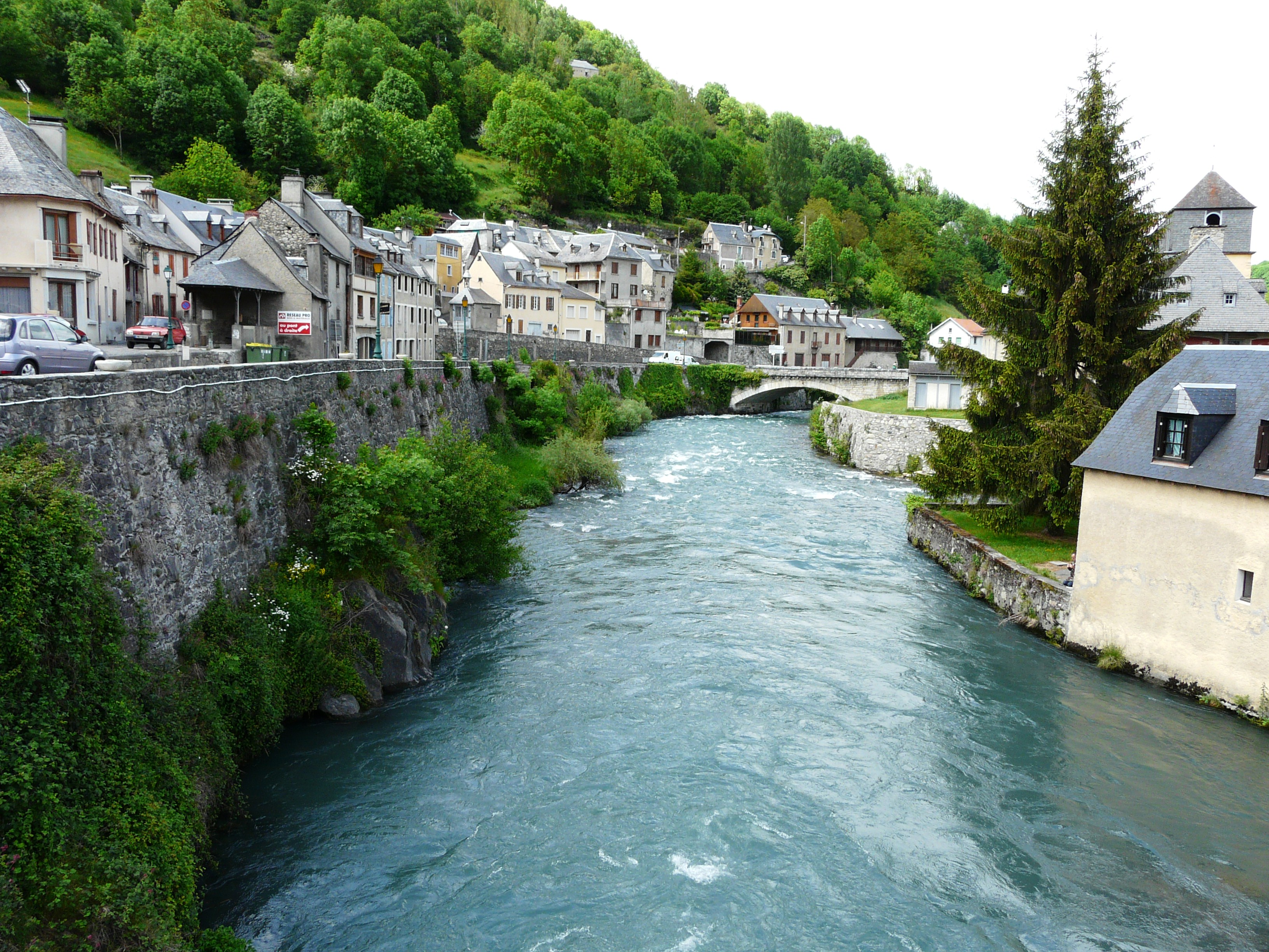 La Neste d'Aure en aval du pont de la route départementale 19, Arreau, Hautes-Pyrénées, France. Elle reçoit de la droite la Neste du Louron, prenant alors le nom de Neste.